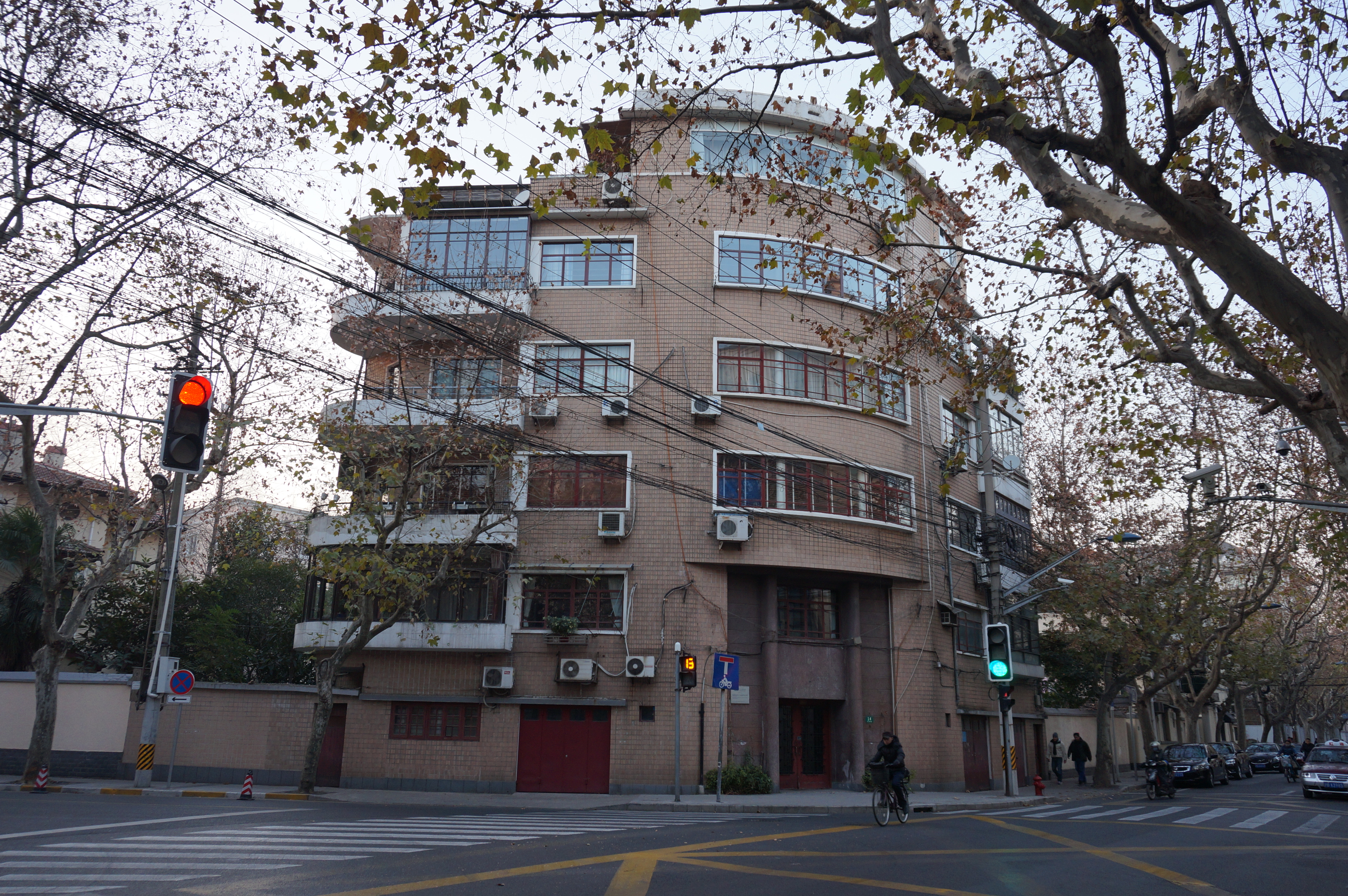 阿麦仑公寓